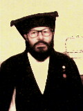 Giampiero "Zampa" Marras.